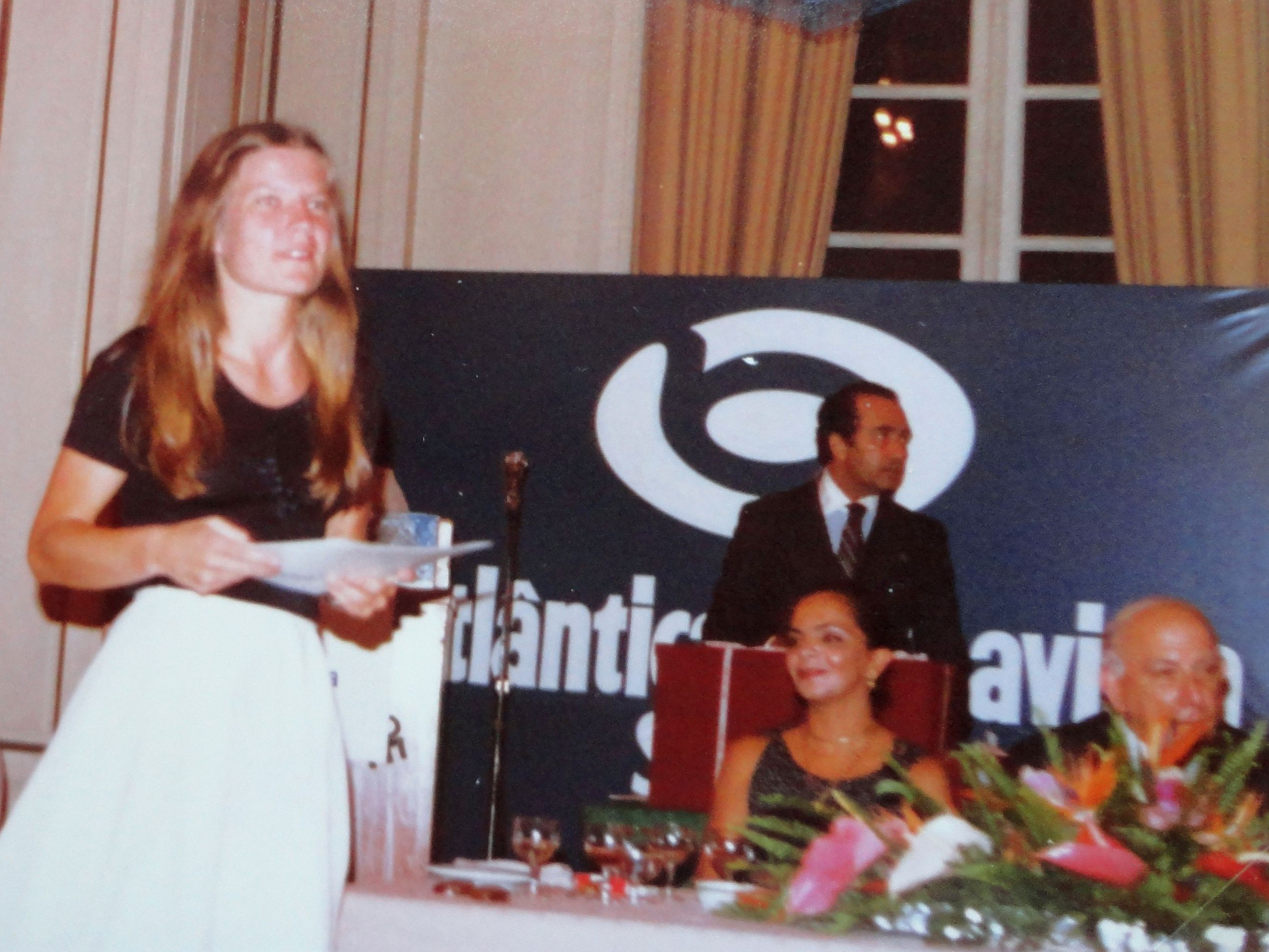 Siegerehrung der Interzonenturniere 1979 in Rio de Janeiro, links Gisela Fischdick.